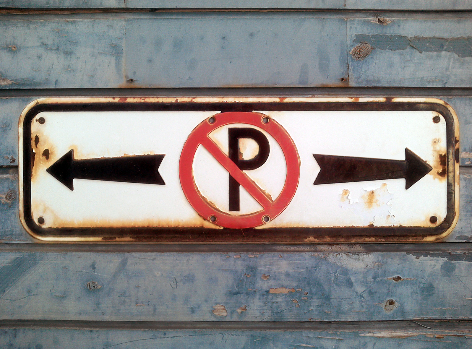 Zusatztafel „Verlauf des Verbots" mit Bild 23 „Parkverbot“. Ein auch im Jahr 2017 noch im Einsatz befindliches Schild. Die erste Version dieses Schildes wurde für die Straßenverkehrs-Ordnung (StVO) von 1937 eingeführt, die am 1. Januar 1938 rechtsgültig wurde. Das damals rechteckige Schild ohne schwarze Umrandung war 150 x 500 mm groß. Das hier gezeigte Schild gehört – wie die abgerundeten Ecken und der schwarze Rand zeigen – zur westdeutschen StVO-Novelle von 1956 und war bis zum 1. März 1971, als die erste westdeutsche Nachkriegs-StVO von 1970 in Kraft trat, ein verbindlich gültiges Verkehrszeichen. Mit der StVO von 1970 wurde das Schild aus dem Verkehrszeichenkatalog gestrichen. Die Bemaßungen des hier gezeigten plastisch aus Blech gestanzten Schildes, das ursprünglich im Siebdruckverfahren bedruckt war und spätere in den weißen und schwarzen Zonen Übermalungen erhielt, habe ich abgenommen. Sie sind folgende: Gesamtbreite: 5950 mm Gesamthöhe: 1950 mm Lichtkantenbreite: 50 mm Randbreite: 100 mm Ausrundungshalbmesser: 600 mm Pfeilspitzenhöhe: 550 mm Pfeilspitzenlänge: 350 mm Pfeillänge gesamt: 1600 mm Höhe Ende Pfeilschaft: 400 mm Tiefe Ende Pfeilschaft:100 mm Das Schild hat acht mit der Stanzung bereits eingetiefte Bohrlöcher für verschiedene Anwendungszwecke. Das hier verwendete Bild 23 entspricht nicht den detaillierten Vorgaben, die 1956 erlassen worden sind. Schilder dieser Art wurde nicht nur aus Blech gestanzt, sondern auch auf Mauern gemalt. So habe ich 2016 an der Burgsteige, der Auffahrt zum Schloß Hohentübingen, eine solche aufgemalte Version dokumentieren können.